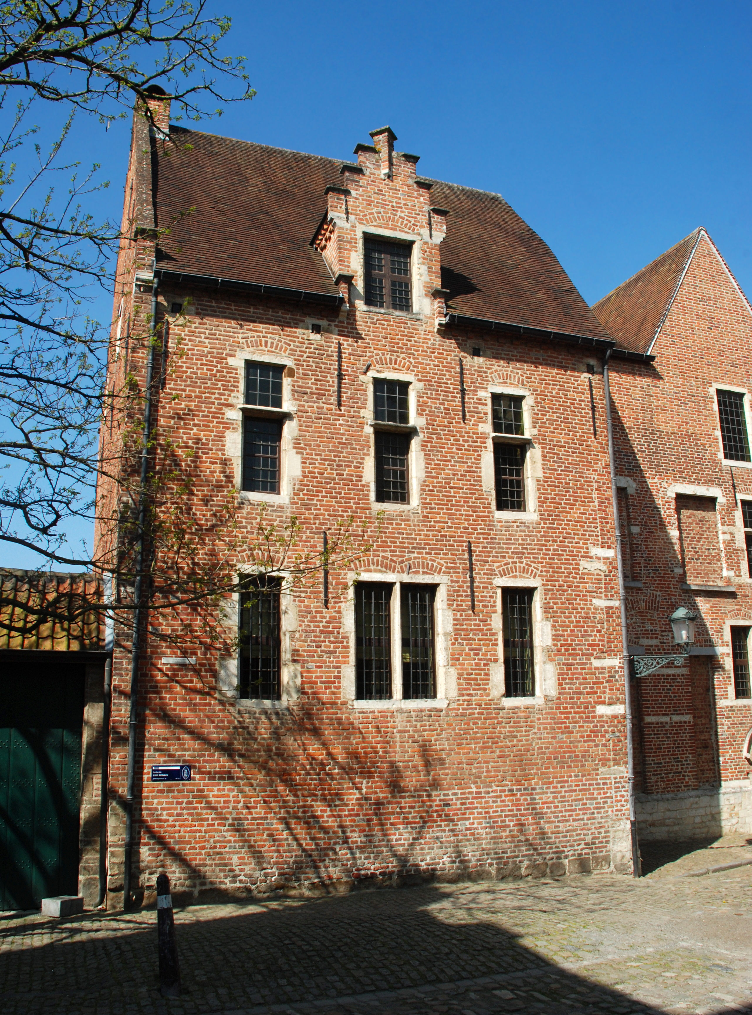 Belgium - Leuven - Groot Begijnhof - Middenstraat n° 14-15 - Faculty club